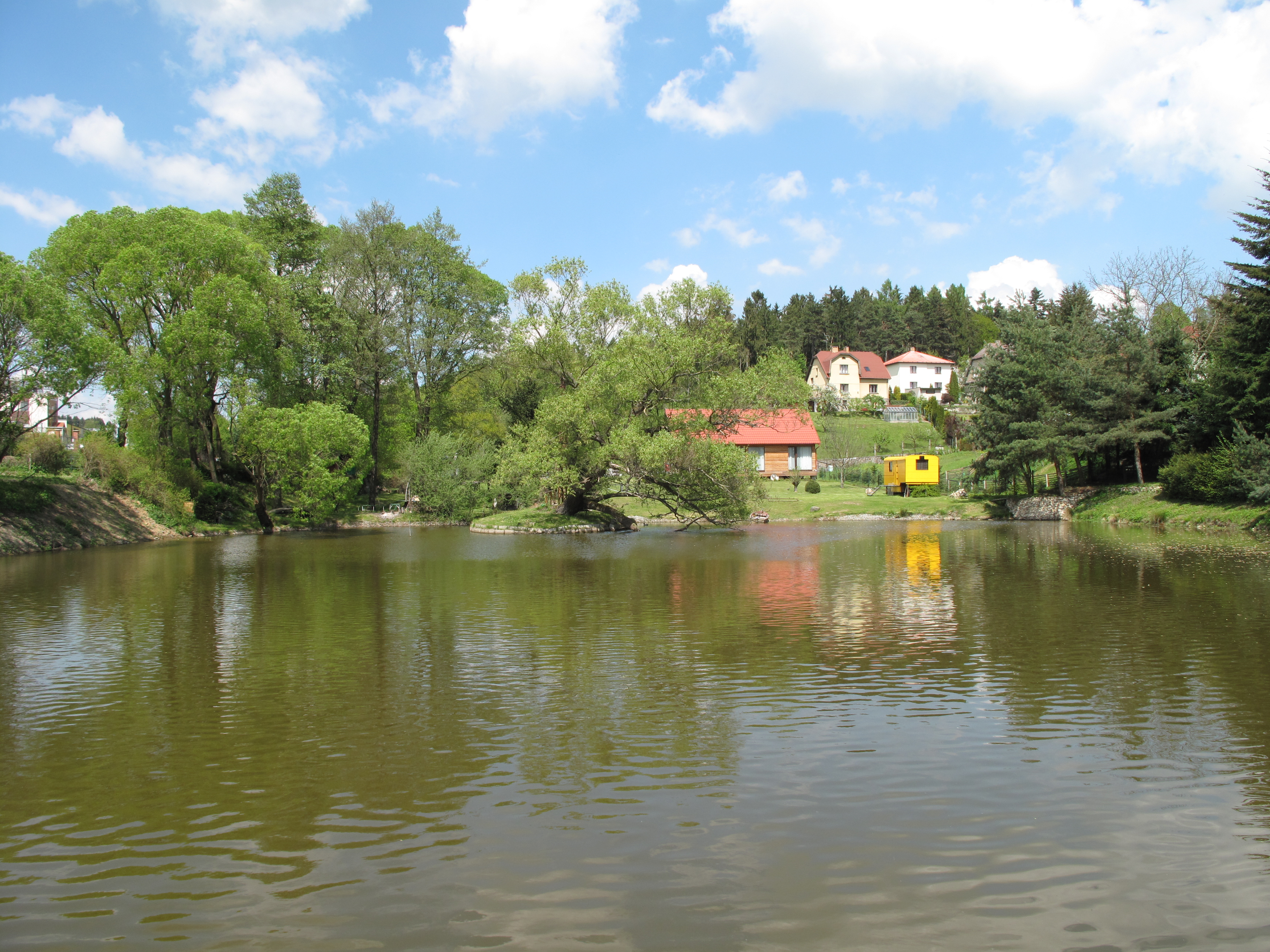 Kovářský rybník ve Velkých Popovicích. Okres Praha-východ, Česká republika.